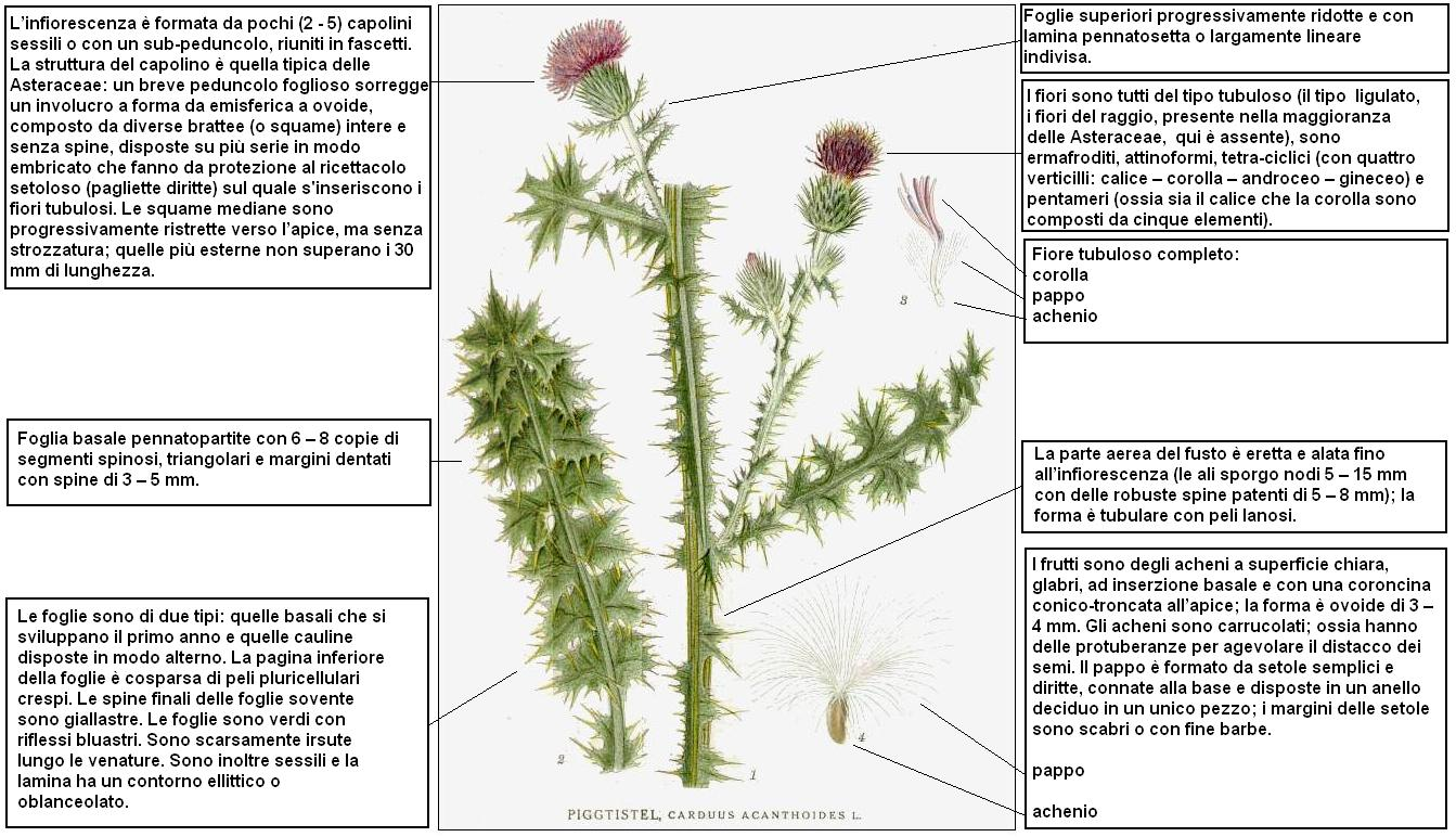 Carduus acanthoides Lindman DESC